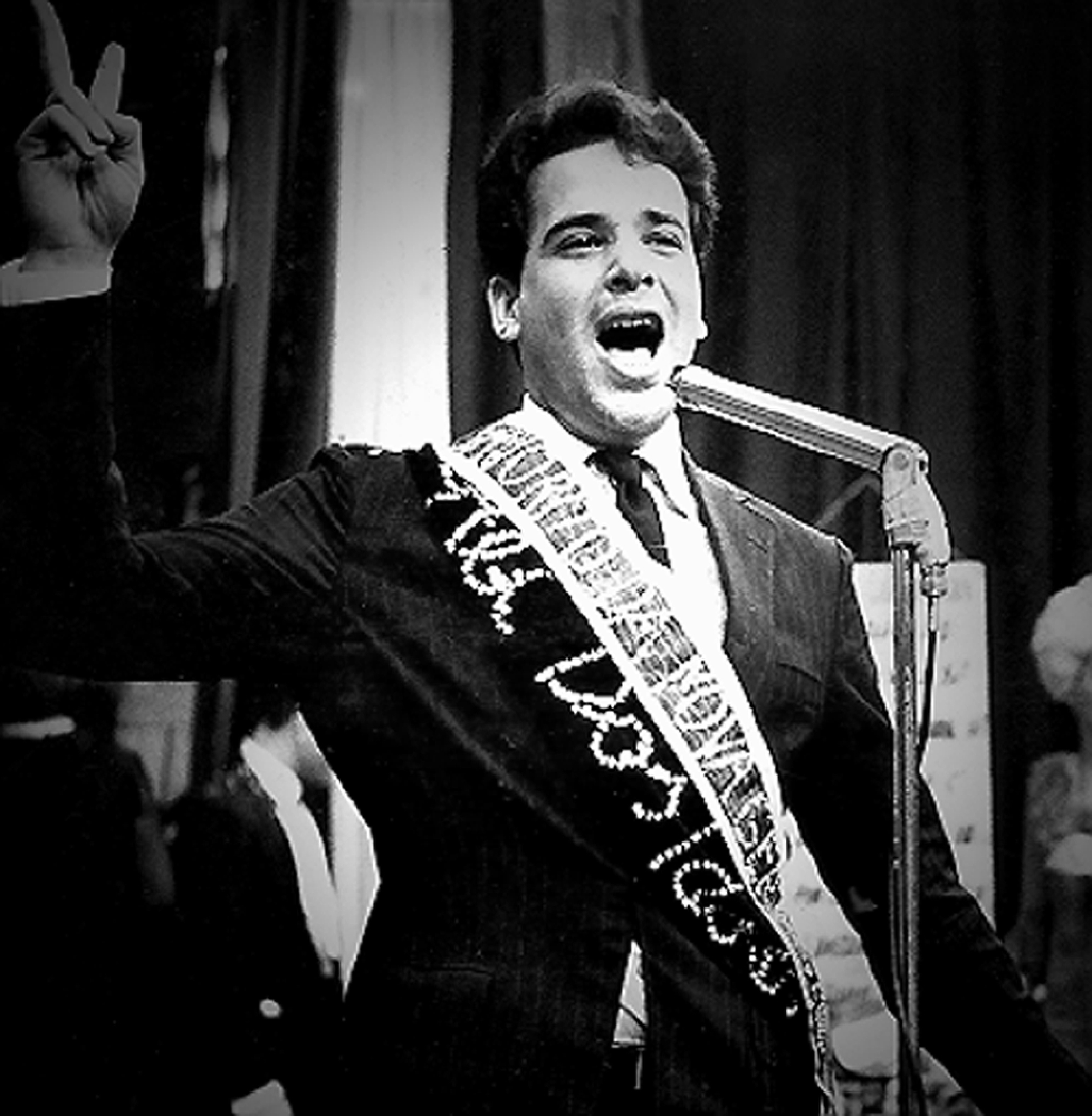 Favoritos da Nova Geração (Instituto FUNJOR)